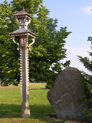 Savarinos k., Mažeikių rajonas, koplytstulpis Fotografavo: Algirdas, 2005 m. rugpjūčio mėn.